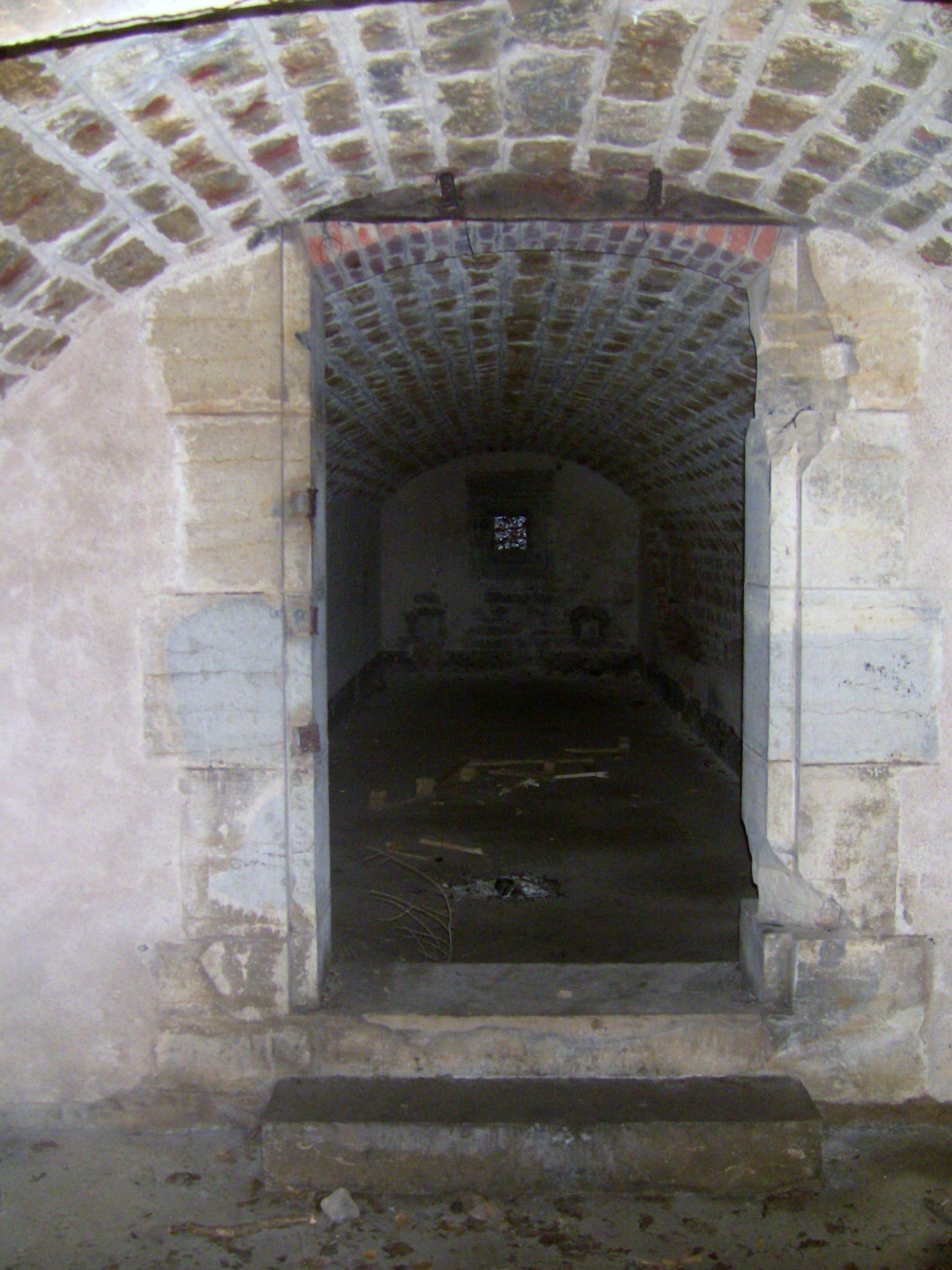 La chambre II de la traverse de la batterie extrême sud-ouest du fort de Planoise, à Besançon (Doubs, France).